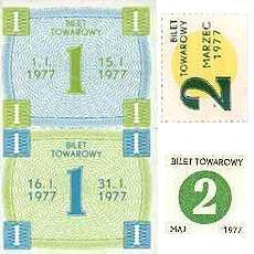 "degradacja" kartek na cukier w ciągu pierwszych miesięcy 1977 - najpierw podobne niemal do banknotów, po paru miesiącach upodobniły się do poślednich znaczków pocztowych